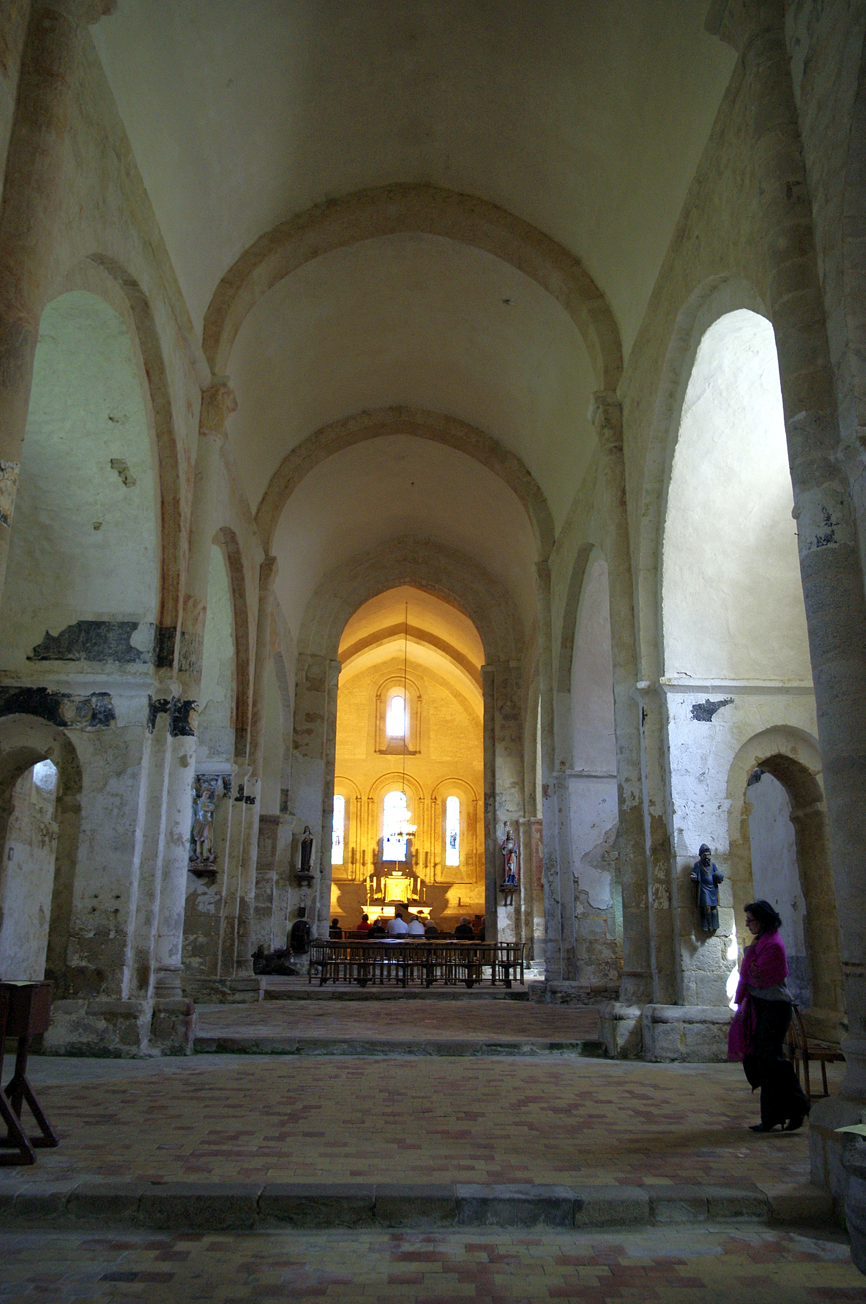 Les Salles-Lavauguyon, l'intérieur de l'église Saint Eutrope.